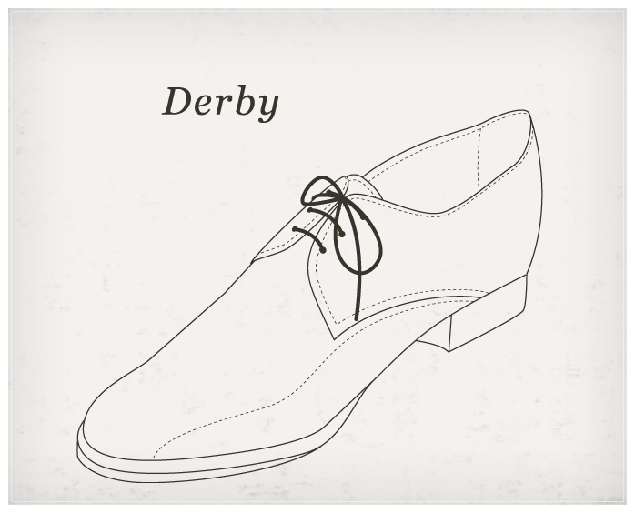 Illustration von einem Derby (Schuh).